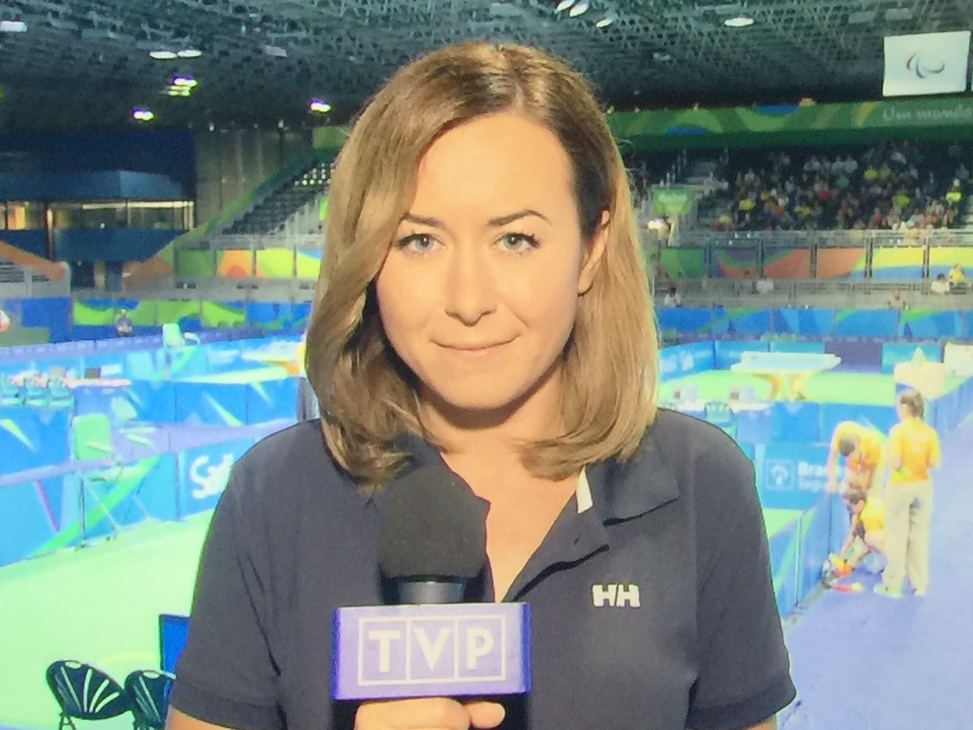 Sylwia Michałowska (Marczuk), piłkarka ręczna, później dziennikarka sportowa.